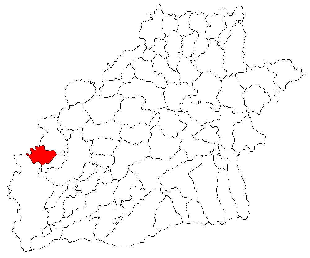 Categorie:Hărţi ale judeţului Sibiu